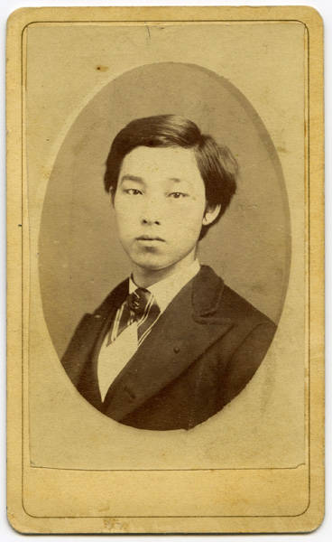 田村初太郎